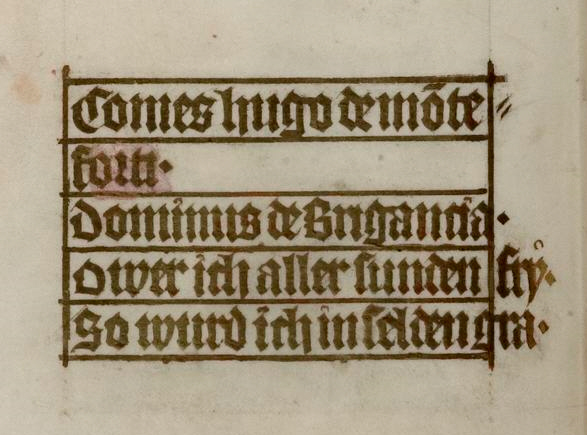 Autorensignatur und Devise Hugos von Montfort in der Handschrift Cod. Pal. germ. 329 Hugo von Montfort: Lieder, Briefe und Reden, Steiermark, 1414/1415, Seite: 53v